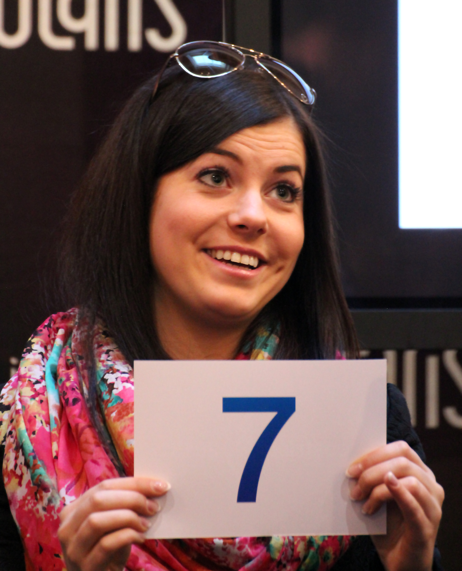 Birgit Õigemeel konkursi Eesti Laul 2013 finaalkontserdi esinemisjärjekorra loosimisel.